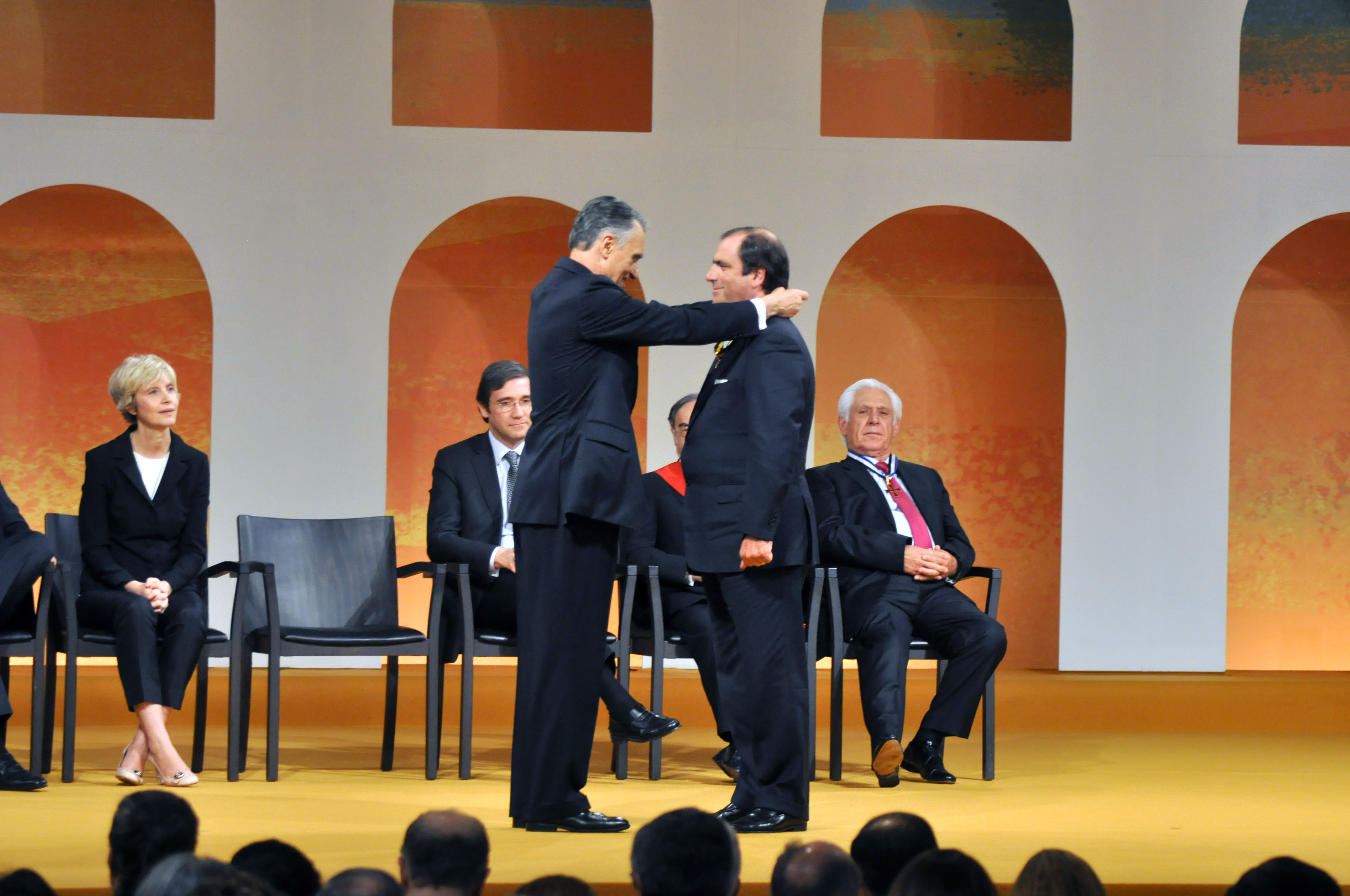 Comendador da Ordem de Mérito desde 2013, atribuído pelo Presidente da República da época, Cavaco Silva.